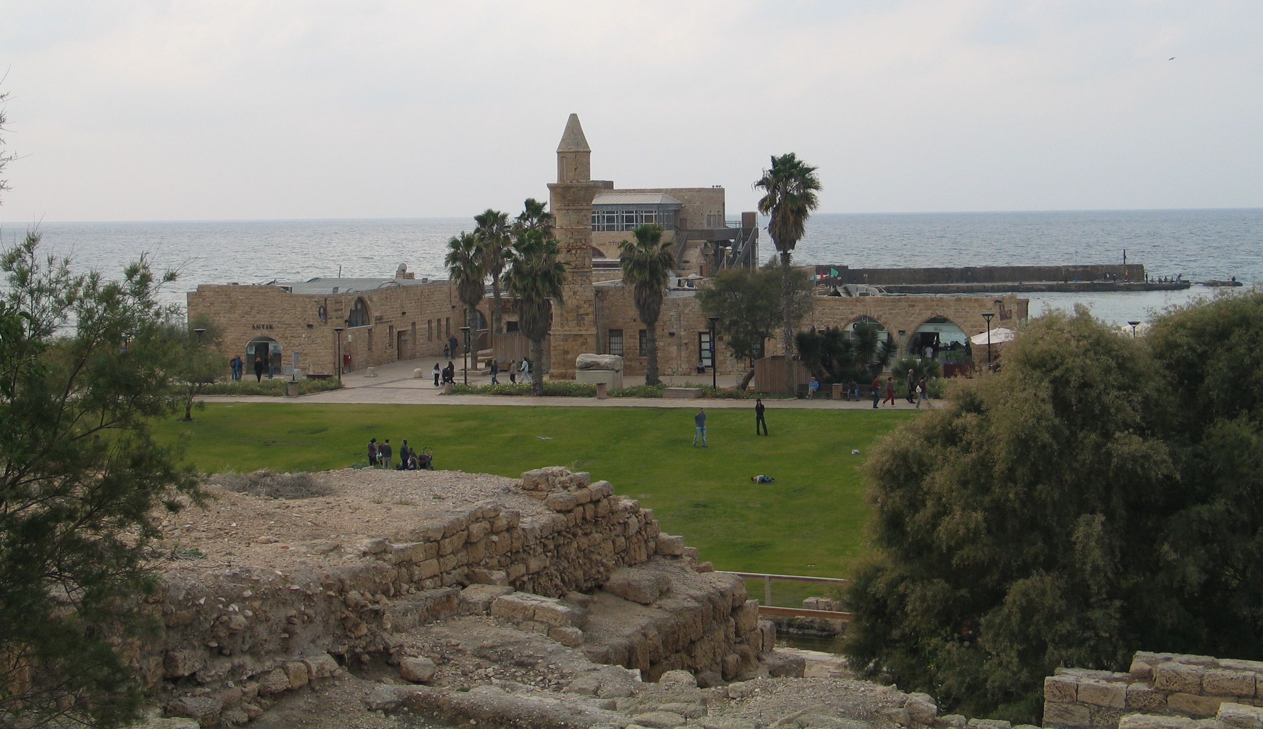 Caesarea Maritima, Israel. Port.